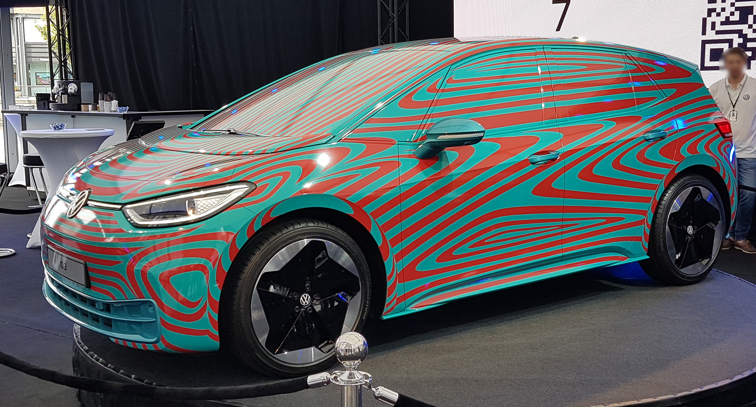 Getarnter VW ID.3 auf öffentlicher Präsentation in Oslo Ende August 2019